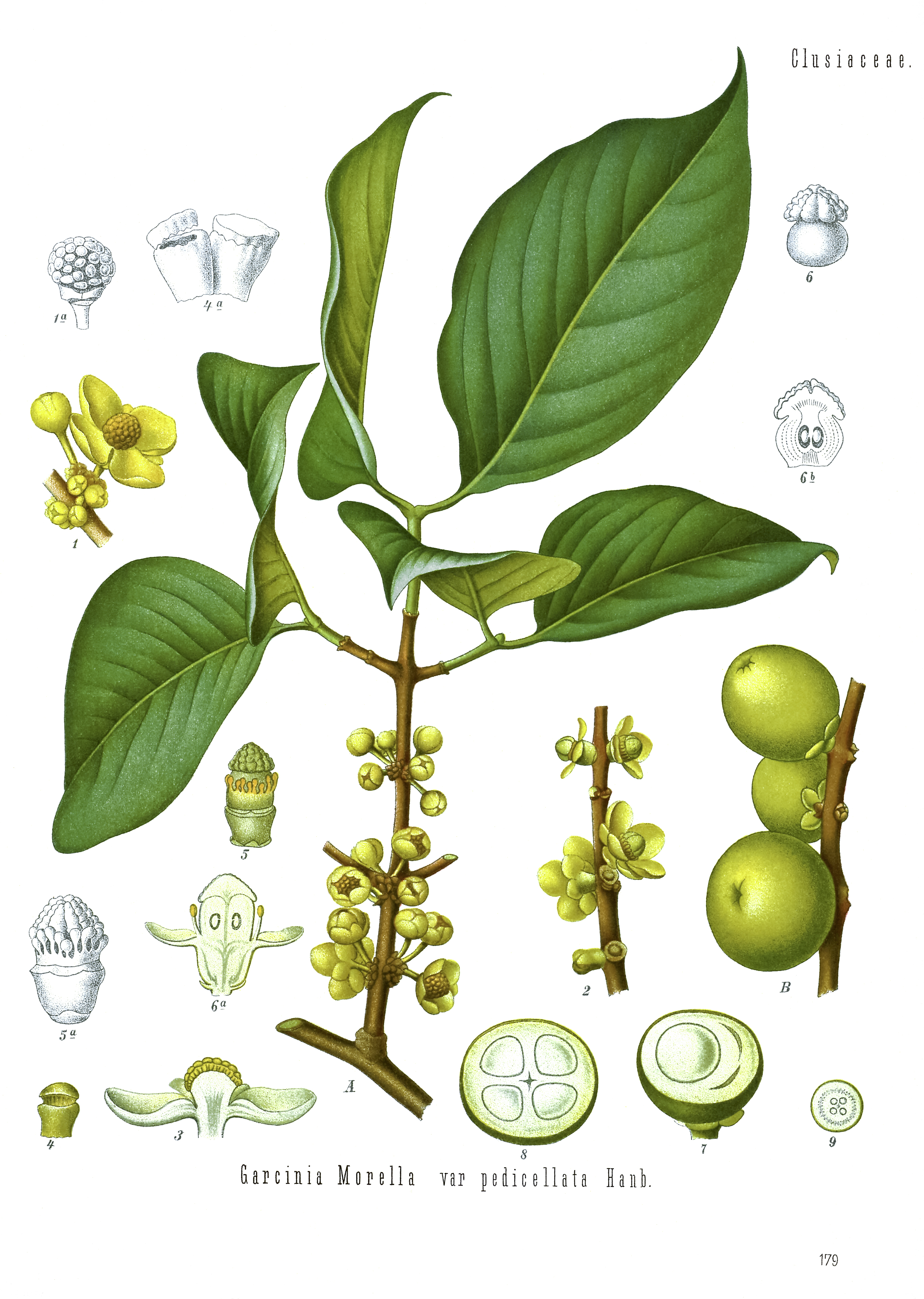 Garcinia. A Blüthenzweig der männlichen Pflanze, natürl. Grösse; B Fruchtzweig, desgl.; 1 Zweigstück mit männlichen Blüthen, vergrössert; 1a Staubgefässköpfchen nach Hanbury, desgl.; 2 Zweigstück mit weiblichen Blüthen, desgl.; 3 männliche Blüthe im Längsschnitt, desgl.; 4 geöffnetes Staubgefäss, desgl.; 4a 2 Staubgefässe geöffnet und ungeöffnet, nach Bâillon; 5 Fruchtknoten mit Staminodienkranz, desgl.; 5a dieselbe Figur, nach Hanbury; 6 Fruchtknoten mit Narbe, desgl., nach Hanbury; 6a weibliche Blüthe im Längsschnitt, desgl.; 6b Fruchtknoten im Längsschnitt, desgl., nach Hanbury; 7 Fruchtquerschnitt mit nur einem fruchtbaren Fache, natürl. Grösse; 8 derselbe mit 4 fruchtbaren Fächern, desgl.; 9 Querschnitt durch den Fruchtknoten, vergrössert.